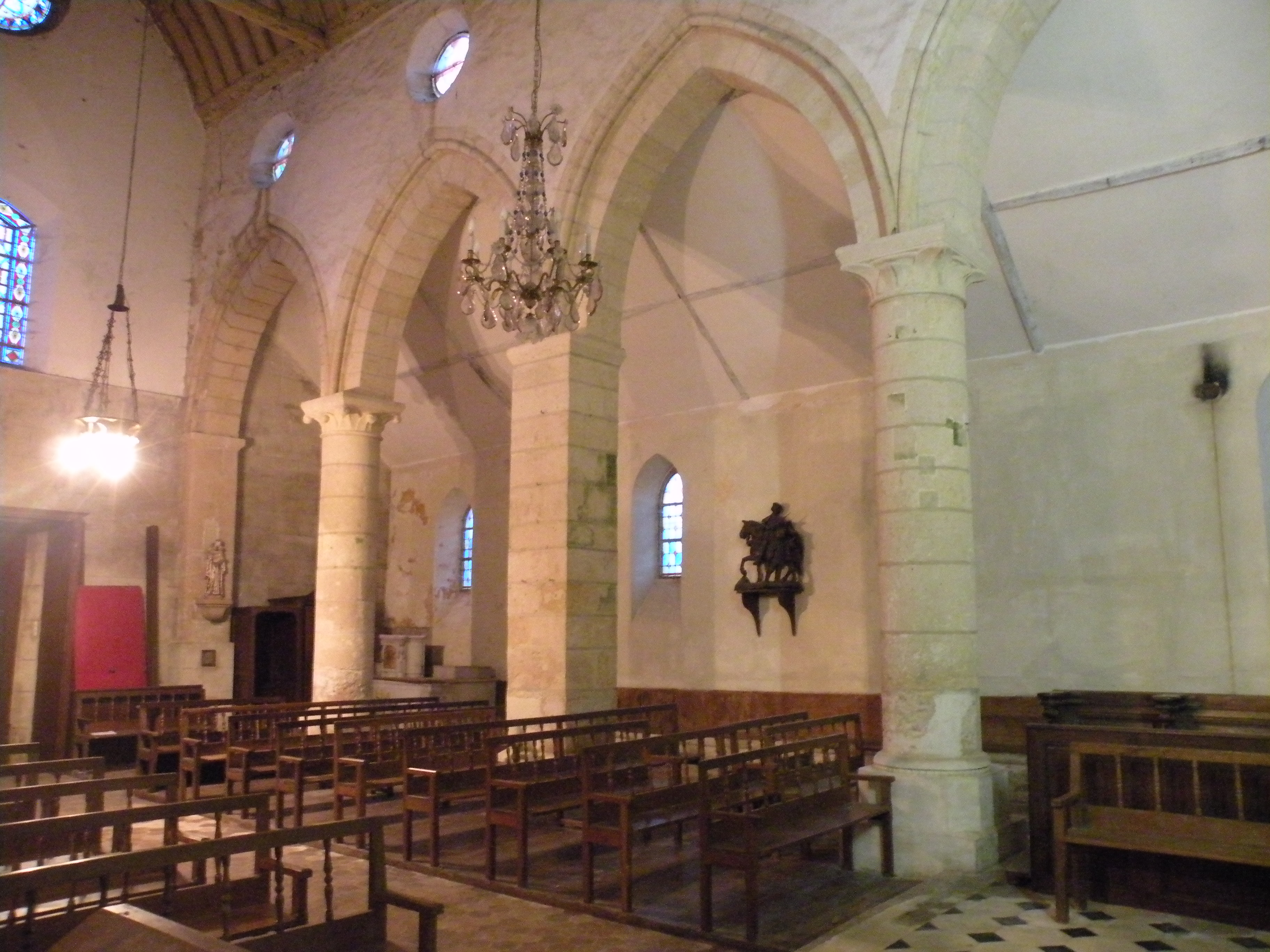 Intérieur de l'église Saint-Martin de Frouville